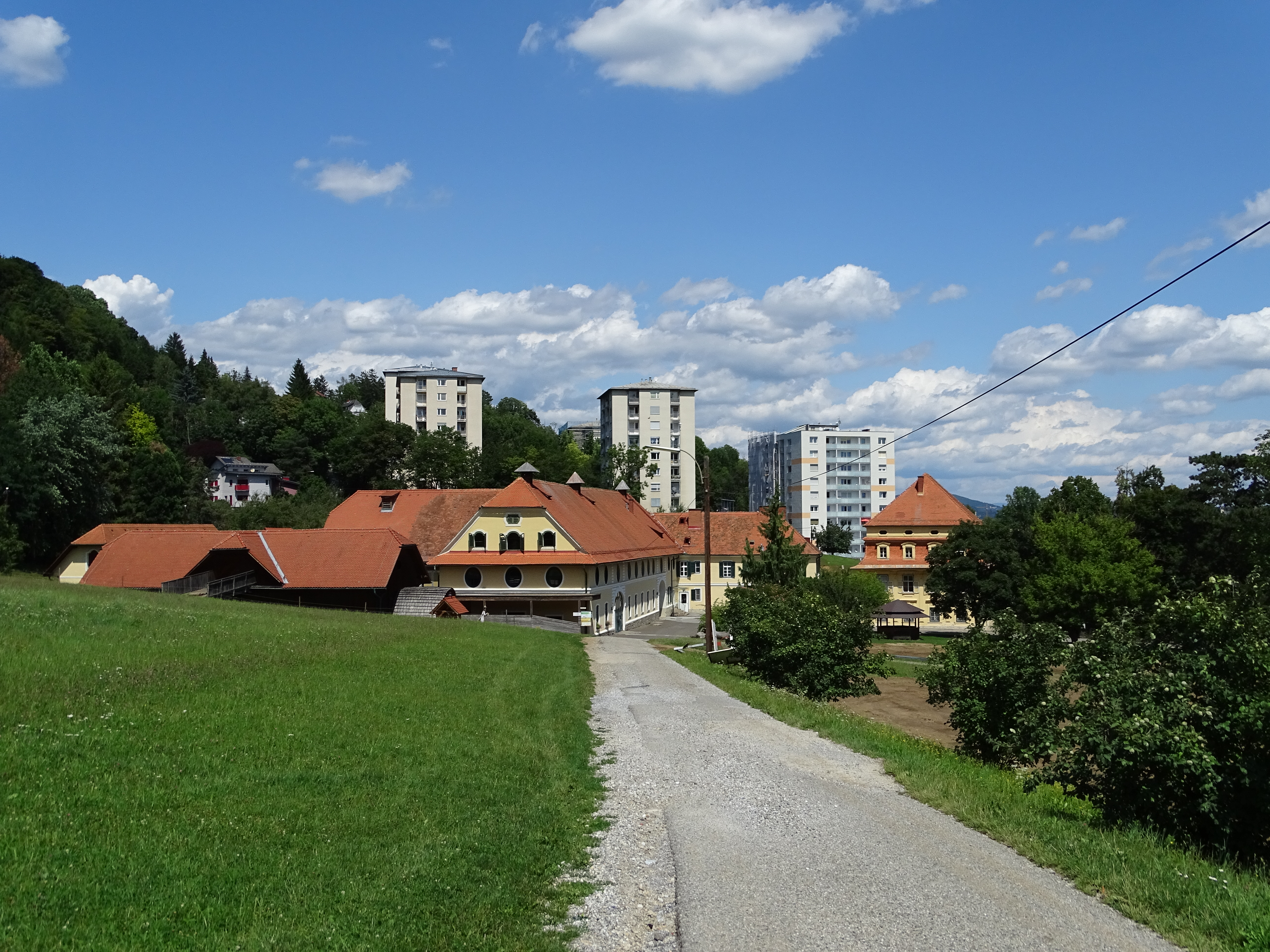 Ehem. Ansitz Krottenstein mit Wirtschaftsgebäude/Fachschule